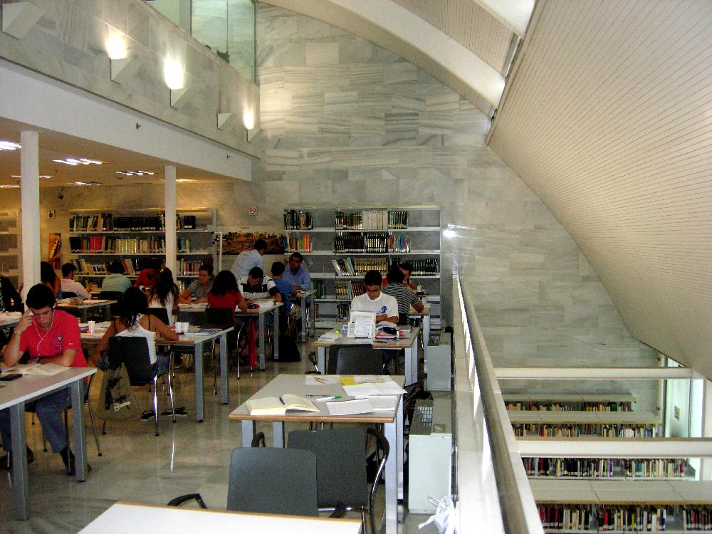 Sala de lectura ubicada en la 4ª planta de la Biblioteca Pública del Estado - Biblioteca Provincial de Huelva